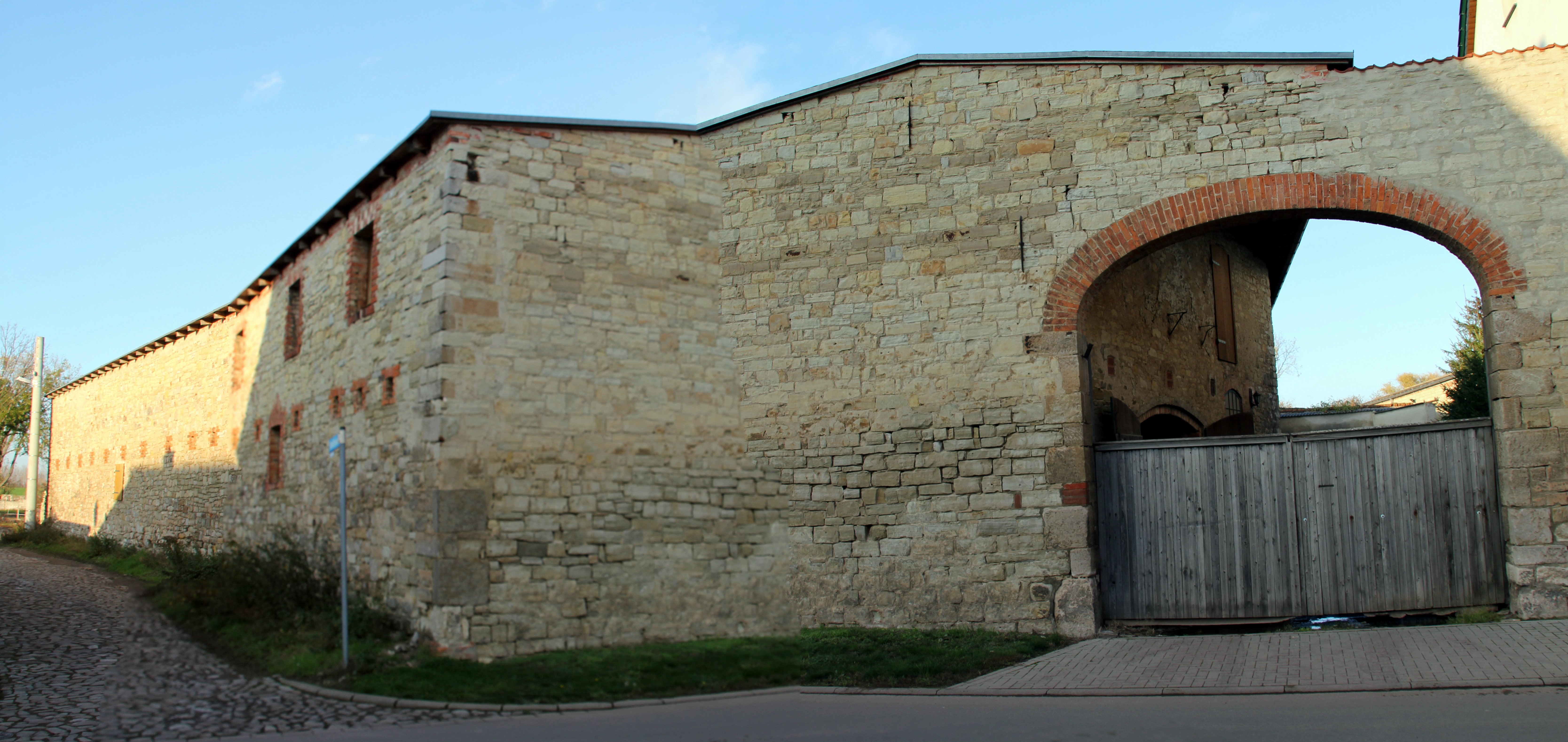 Scheune Lange Straße 25 Ecke Schäferwinkel Groß Rodensleben